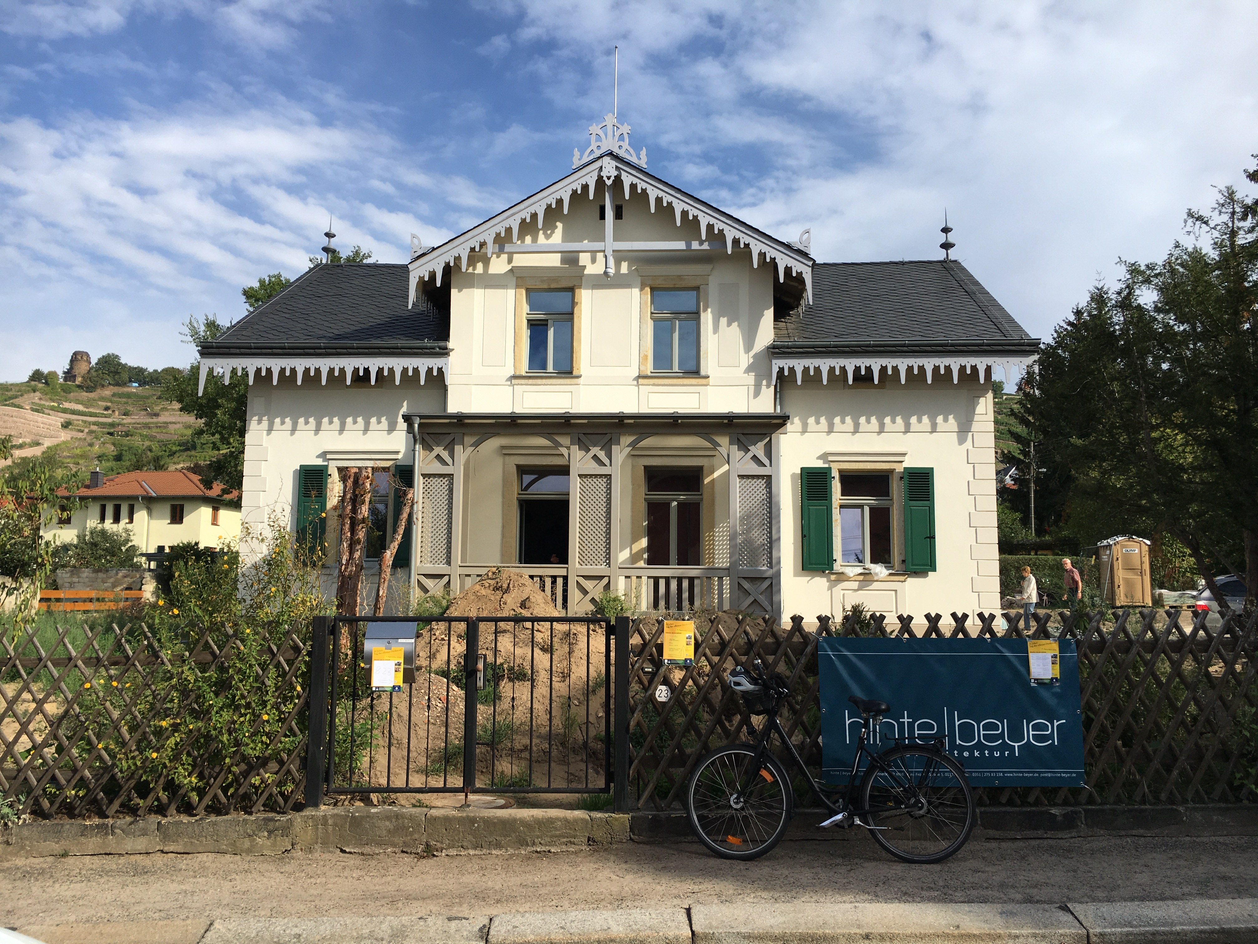 Radebeul Bennostr 23